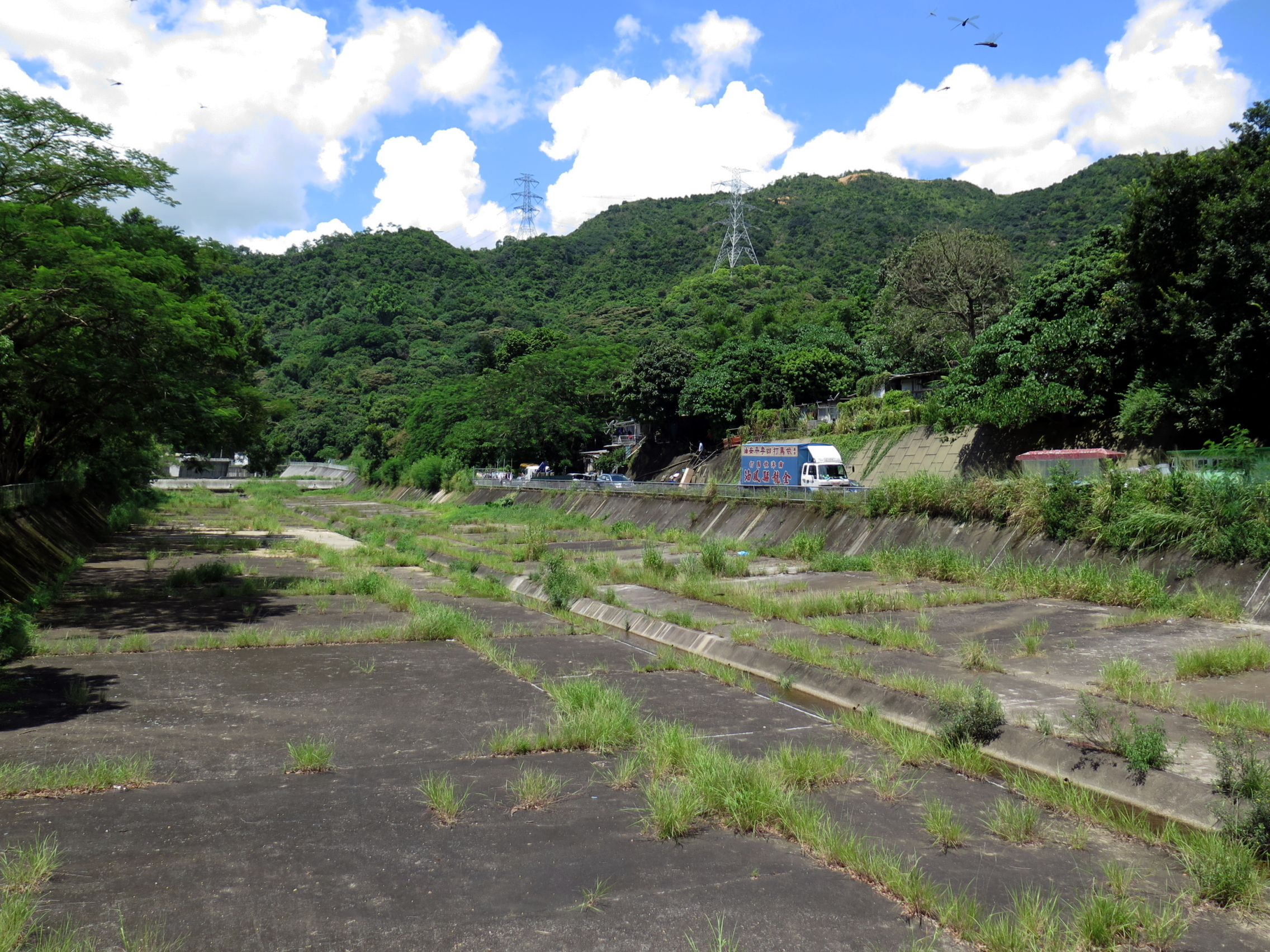 Heung Fan Liu